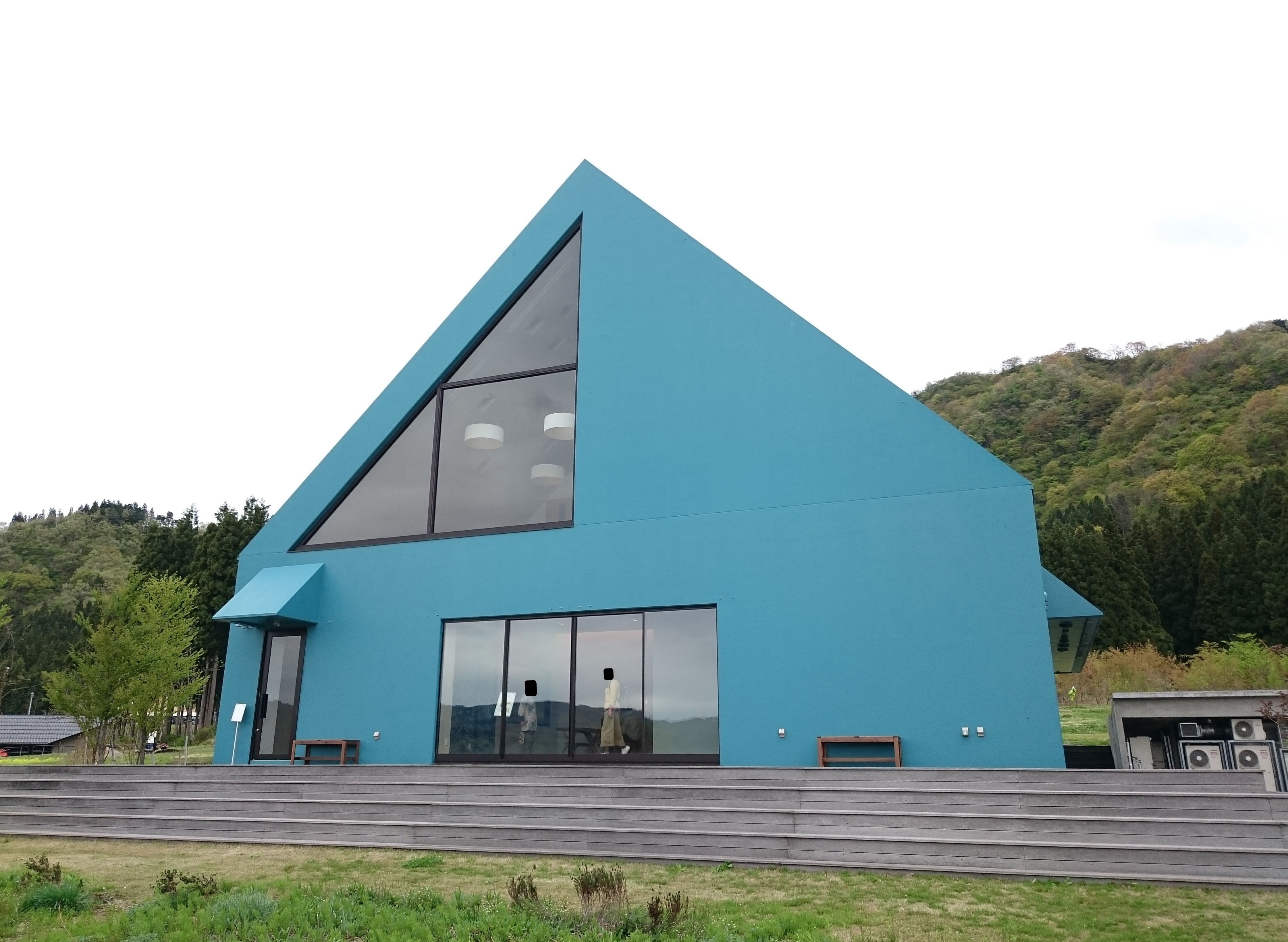 ブランラボの外観